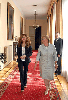 Shakira e Michelle Bachelet. Di Carolonline, da Flickr.